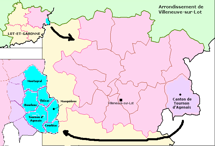 Zone de production du Vin de pays de Thézac-Perricard